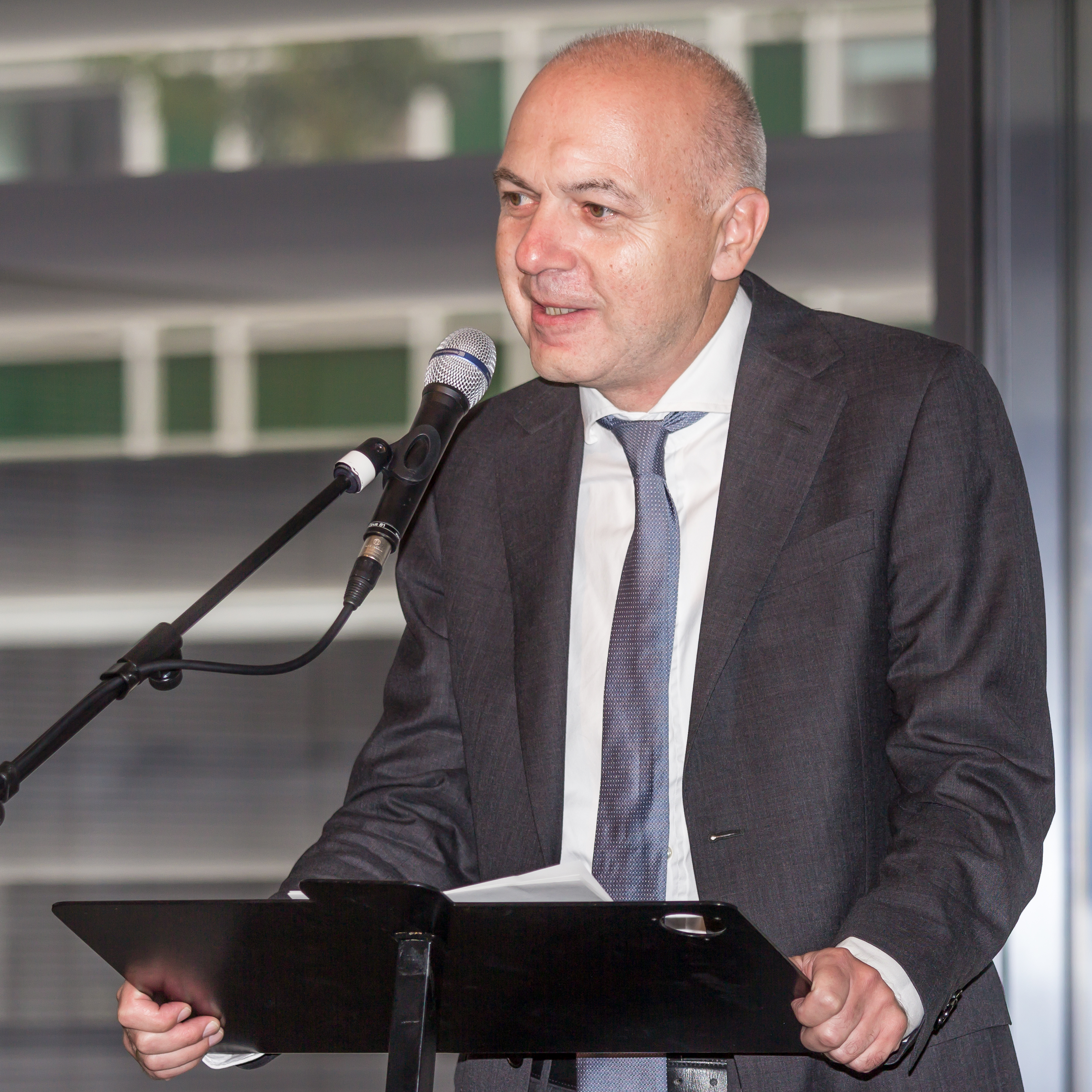 11. Nationaler Aktionstag für die Erhaltung schriftlichen Kulturguts. Motto: „Zusammen sind wir stark! Bestandserhaltung im Verbund“. Veranstaltungsort: FORUM VHS im Kulturquartier am Neumarkt, Köln Foto: Bernd Neuendorf, Staatssekretär im Ministerium für Familie, Kinder, Jugend, Kultur und Sport des Landes Nordrhein-Westfalen